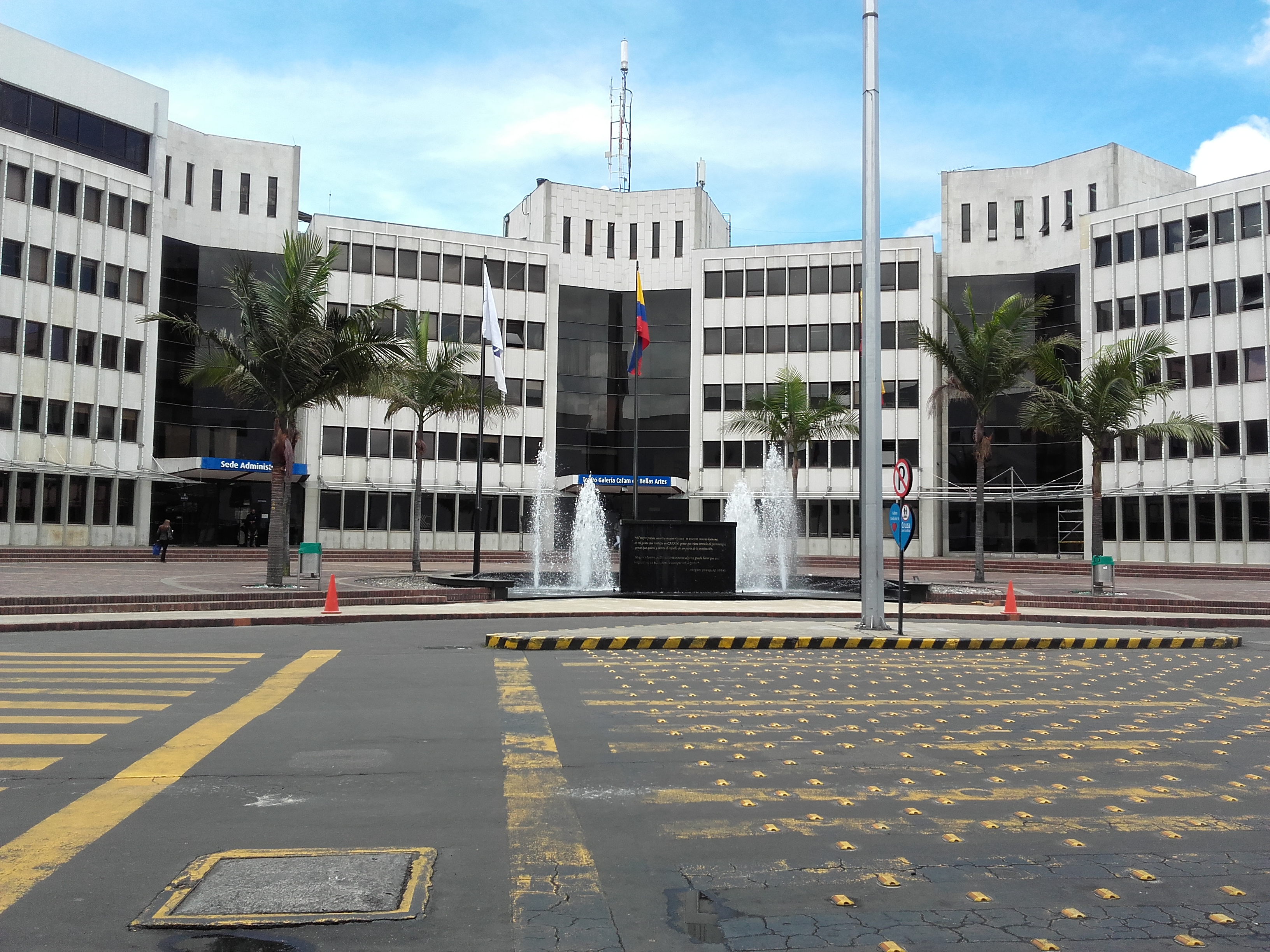 fbdjxbxjbxbjdjjxjxj